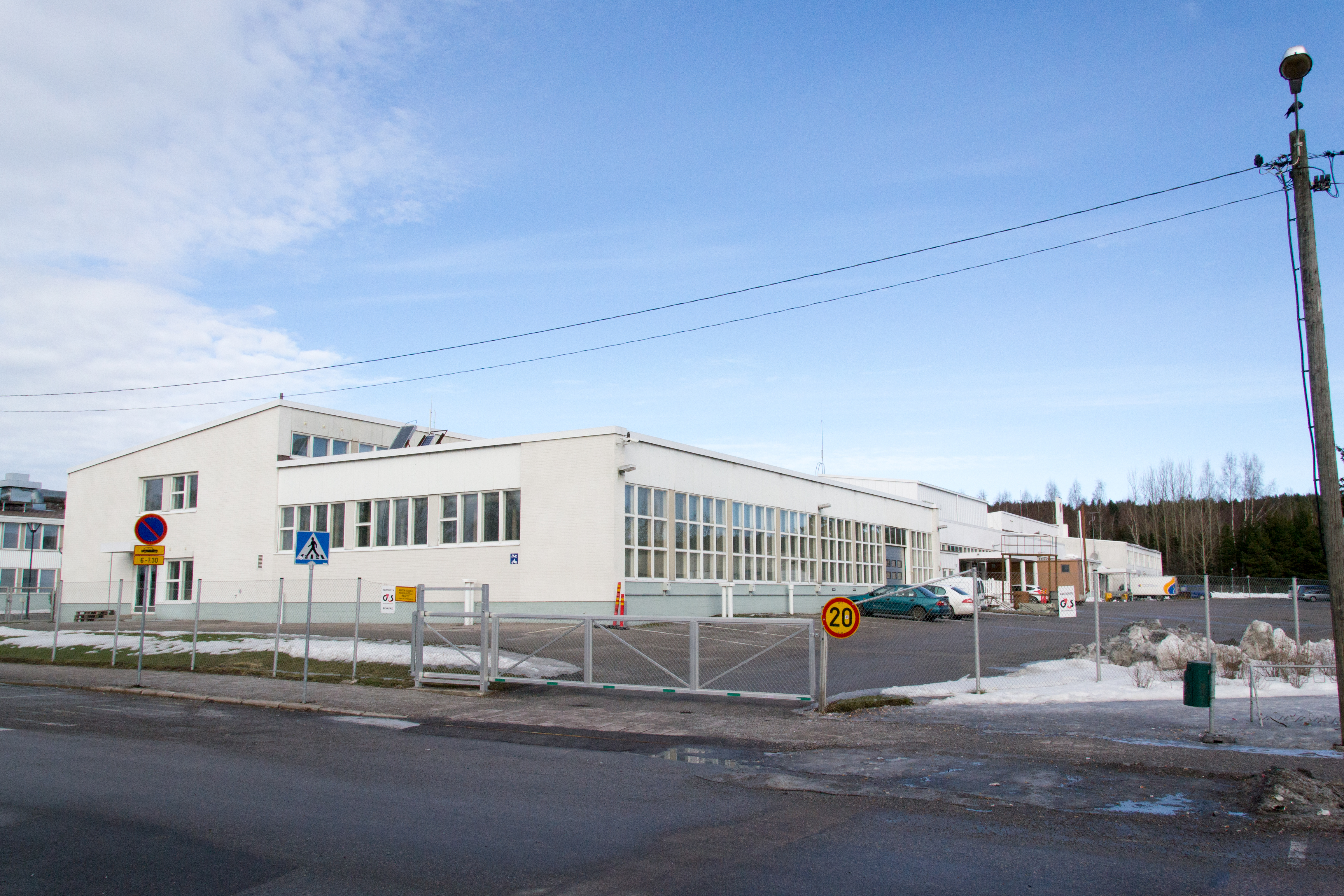 Salon seudun ammattiopiston tekniikan yksikkö, Venemestarinkatu 35, Salo